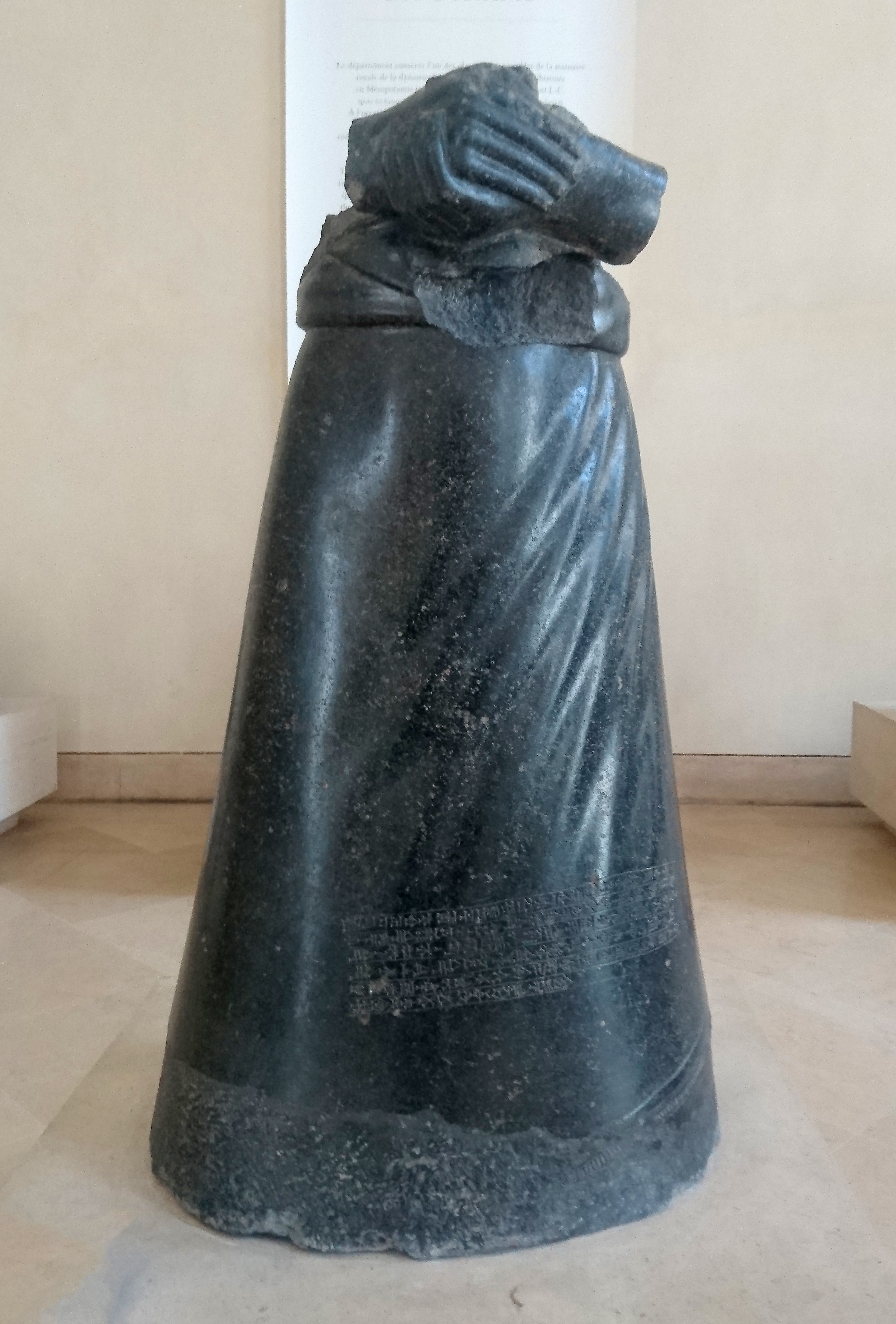 Statue de Manishtusu - Sb 47 - Antiquités orientales du Louvre